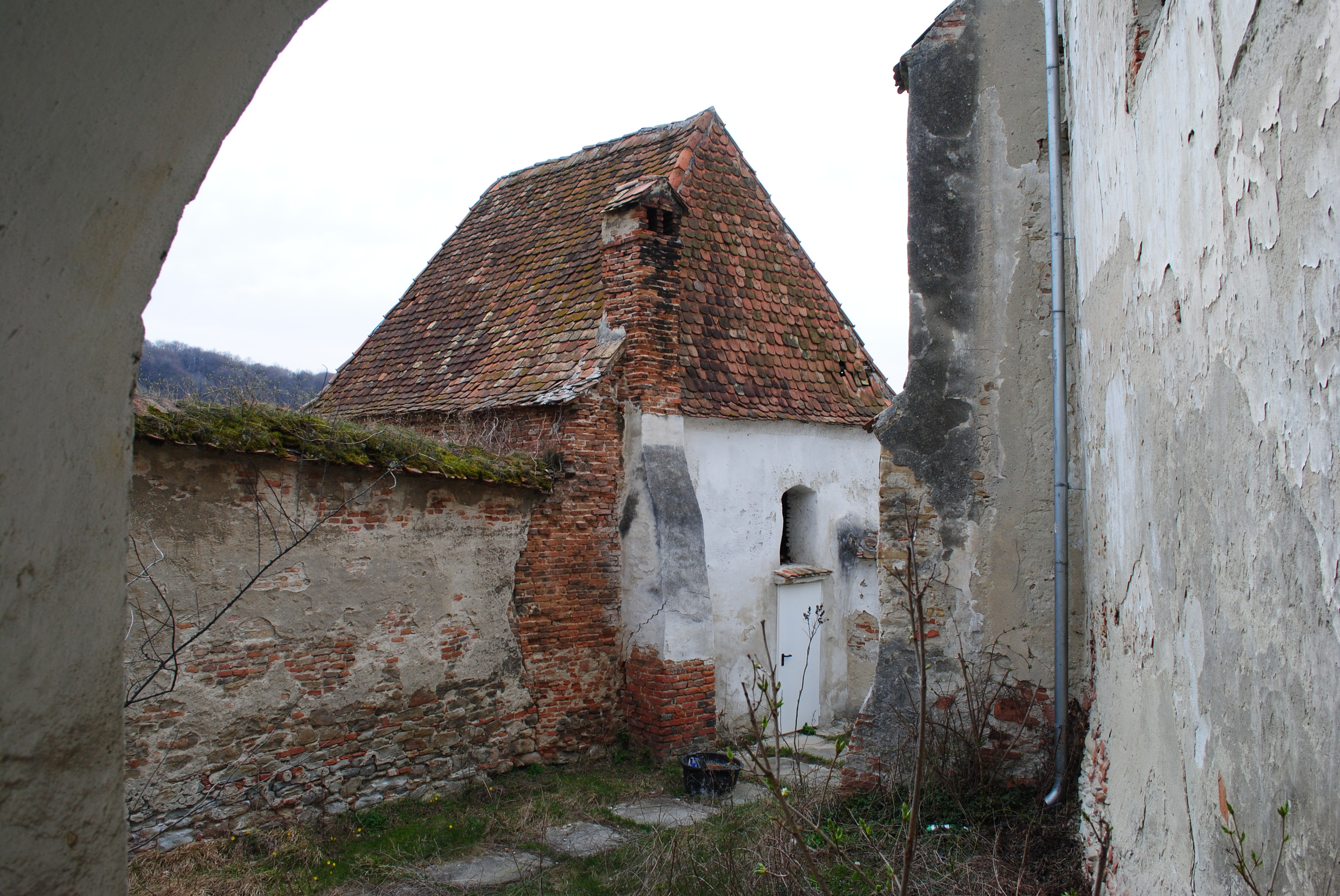 Ansamblul bisericii evanghelice fortificate, sf. sec. XV - sec. XIX